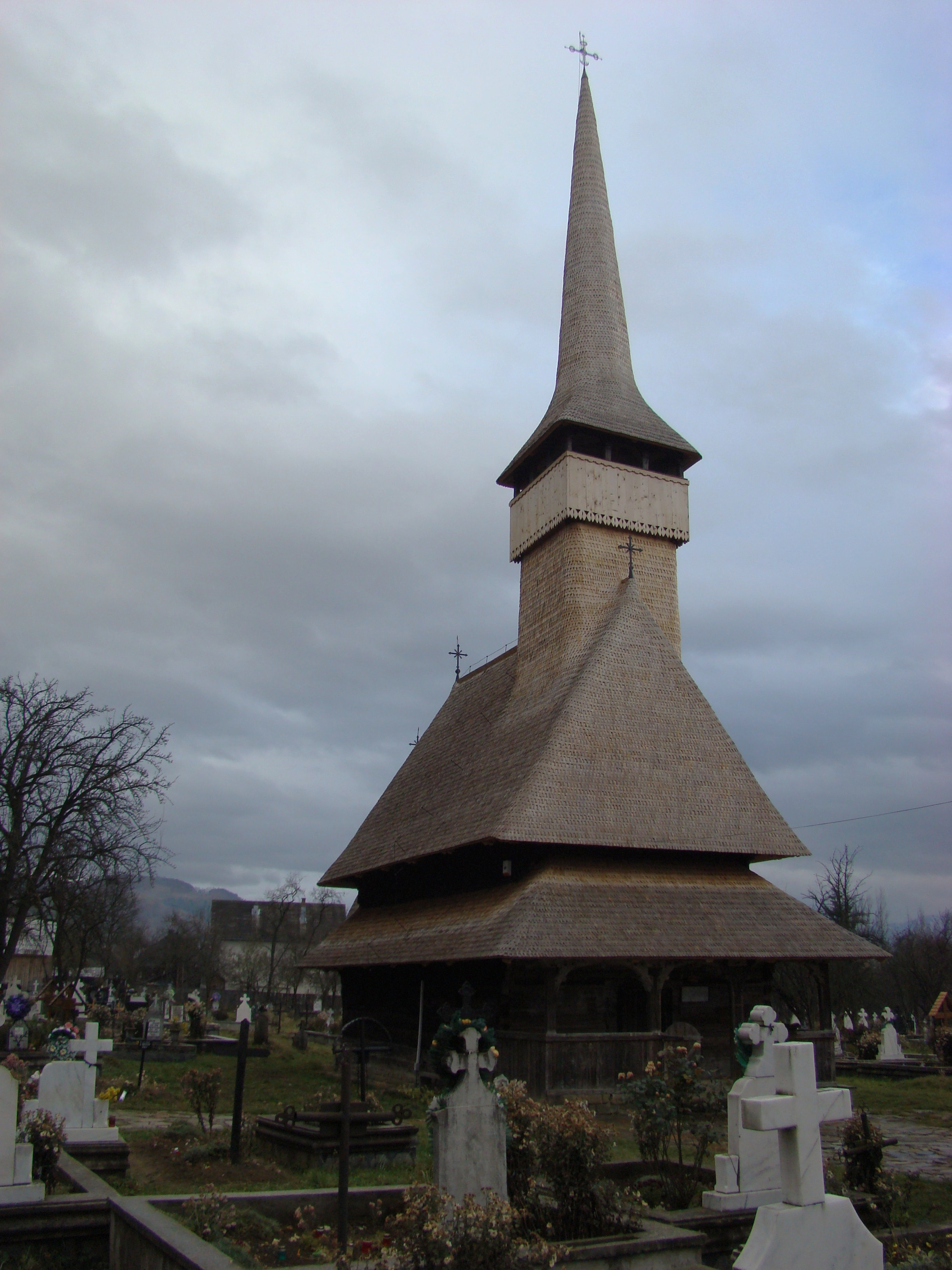 Biserica de lemn „Sf.Arhangheli” din Rozavlea, județul Maramureș 01